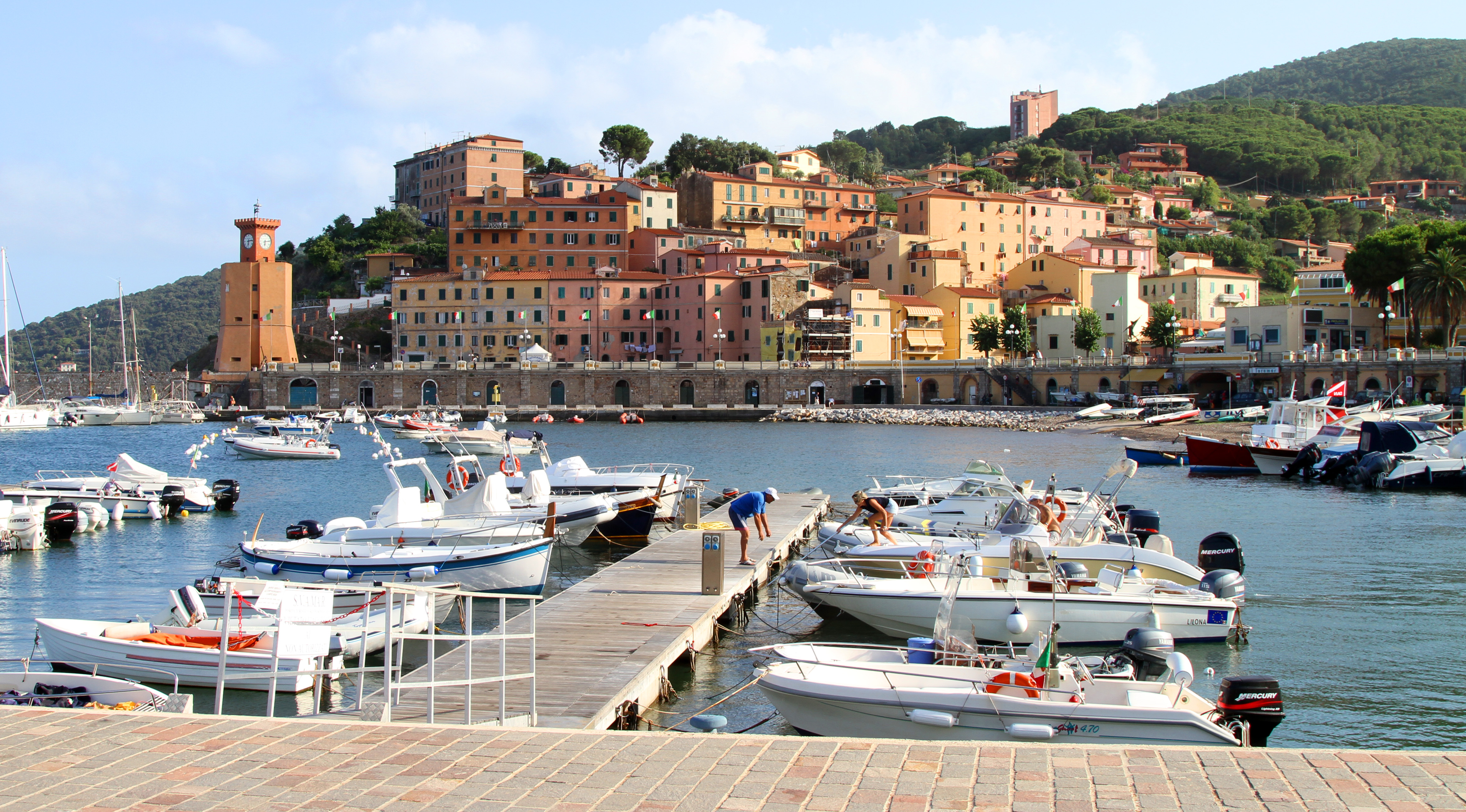 Rio Marina